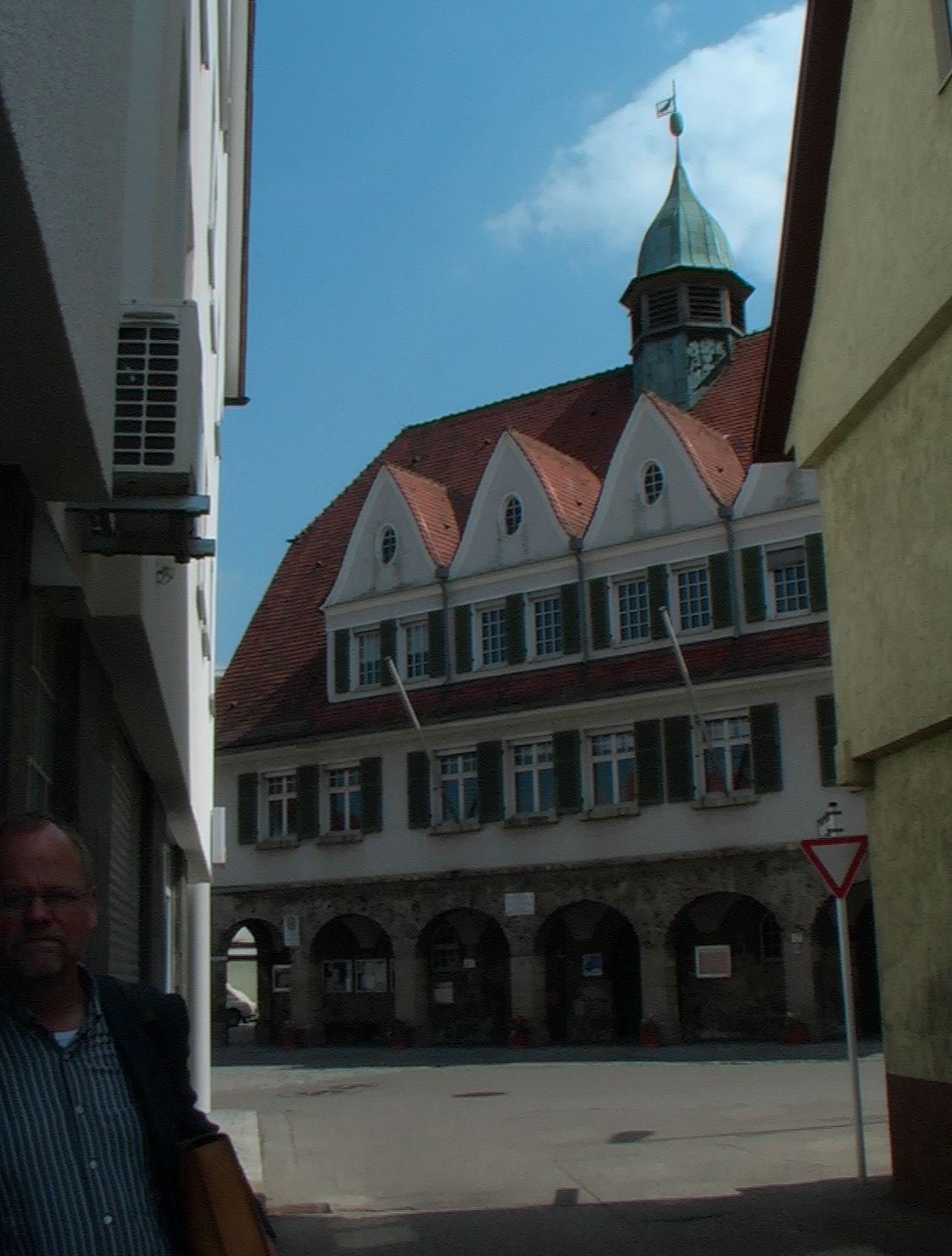 Das Rathaus in Gönningen bei Reutlingen am Stöfflerplatz 2 wurde 1859 von der vormaligen Schildwirtschaft Zum König umgebaut.